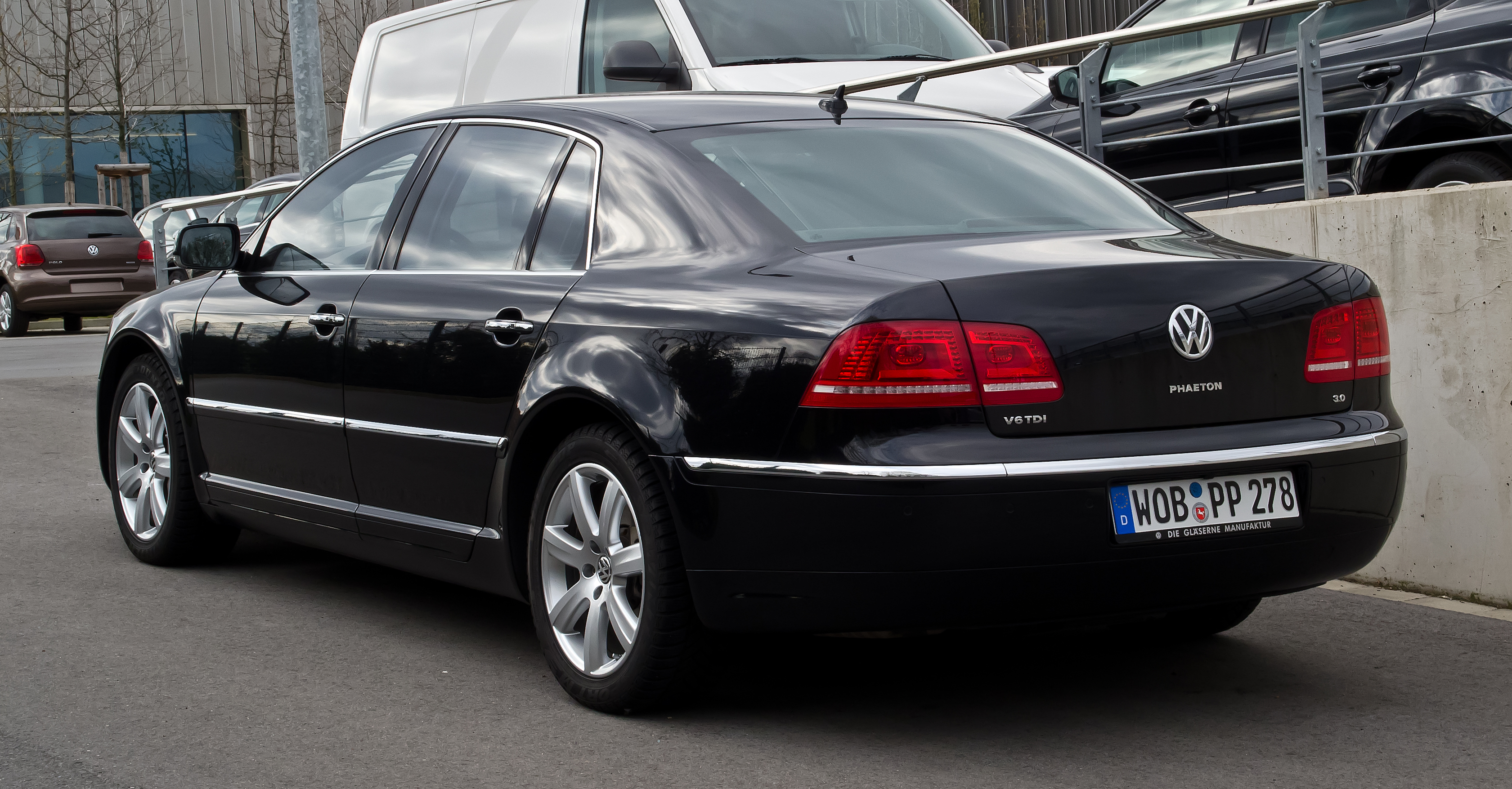 VW Phaeton 3.0 V6 TDI 4MOTION (2. Facelift)